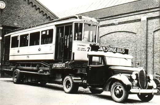 Transport van de Getru 75 richting Amsterdam. Vervaardiger onbekend. Gelet op artikel 38 van de Auteurswet 1912 en de nadere invulling daarvan zoals verduidelijkt onder punt 1.1.5.12 van de Juridische wegwijzer archieven en musea online en de discussie hier is het auteursrecht op deze afbeelding vervallen vanaf 1 januari 2010.